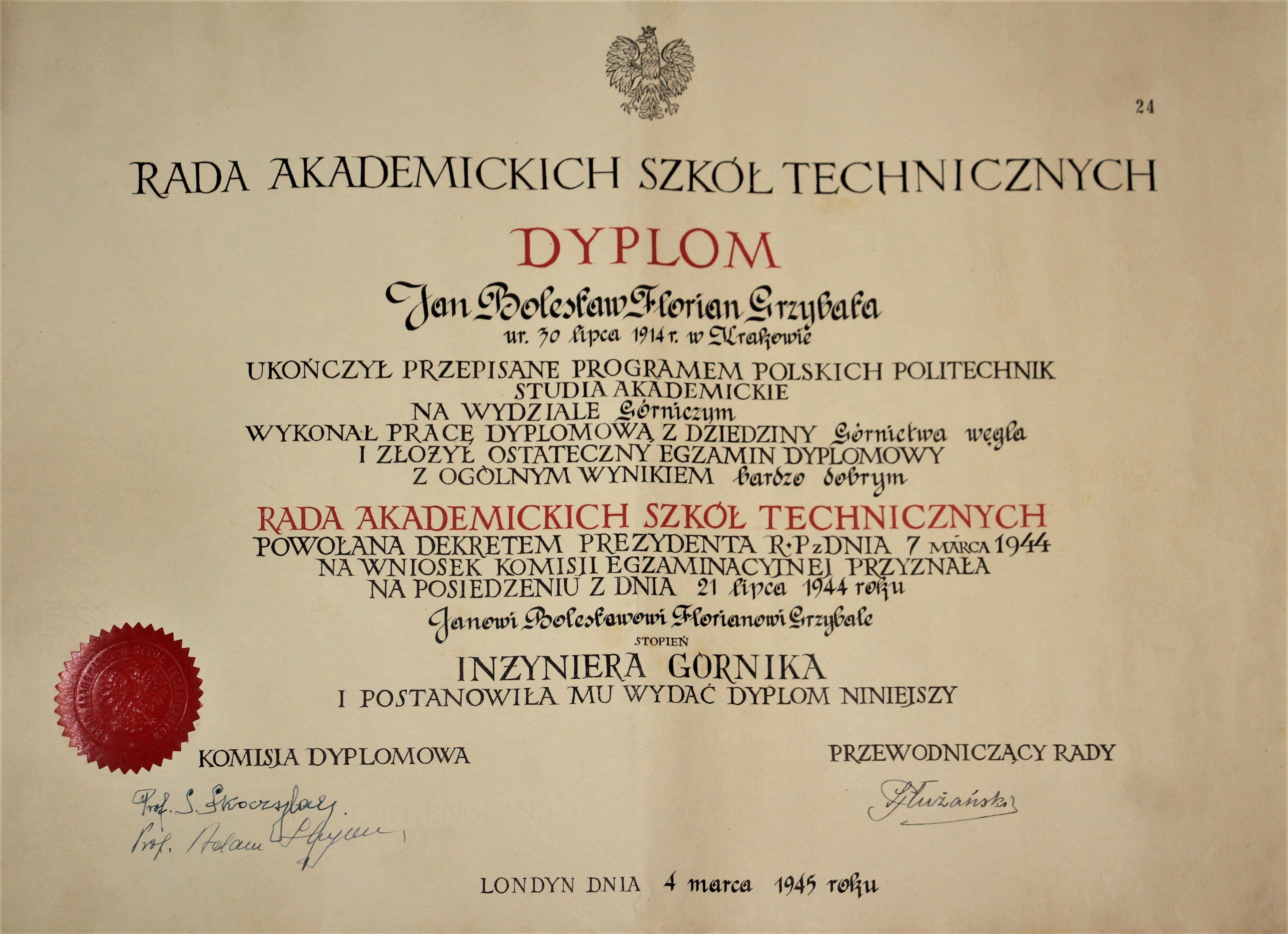 Dyplom inżyniera górnictwa, wydany w Londynie oficerowi Janowi Grzybale z Polski w 1945 roku.